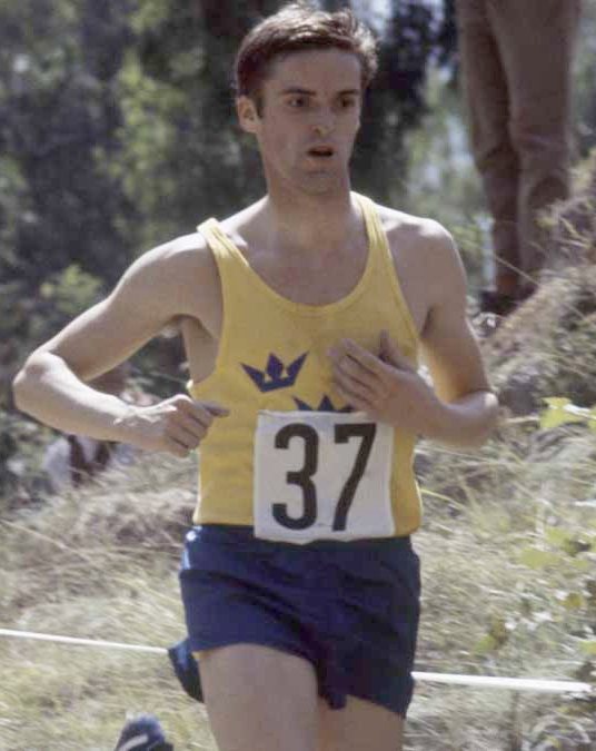 Björn Ferm